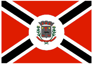 Bandeira Municipal de Lagarto-SE